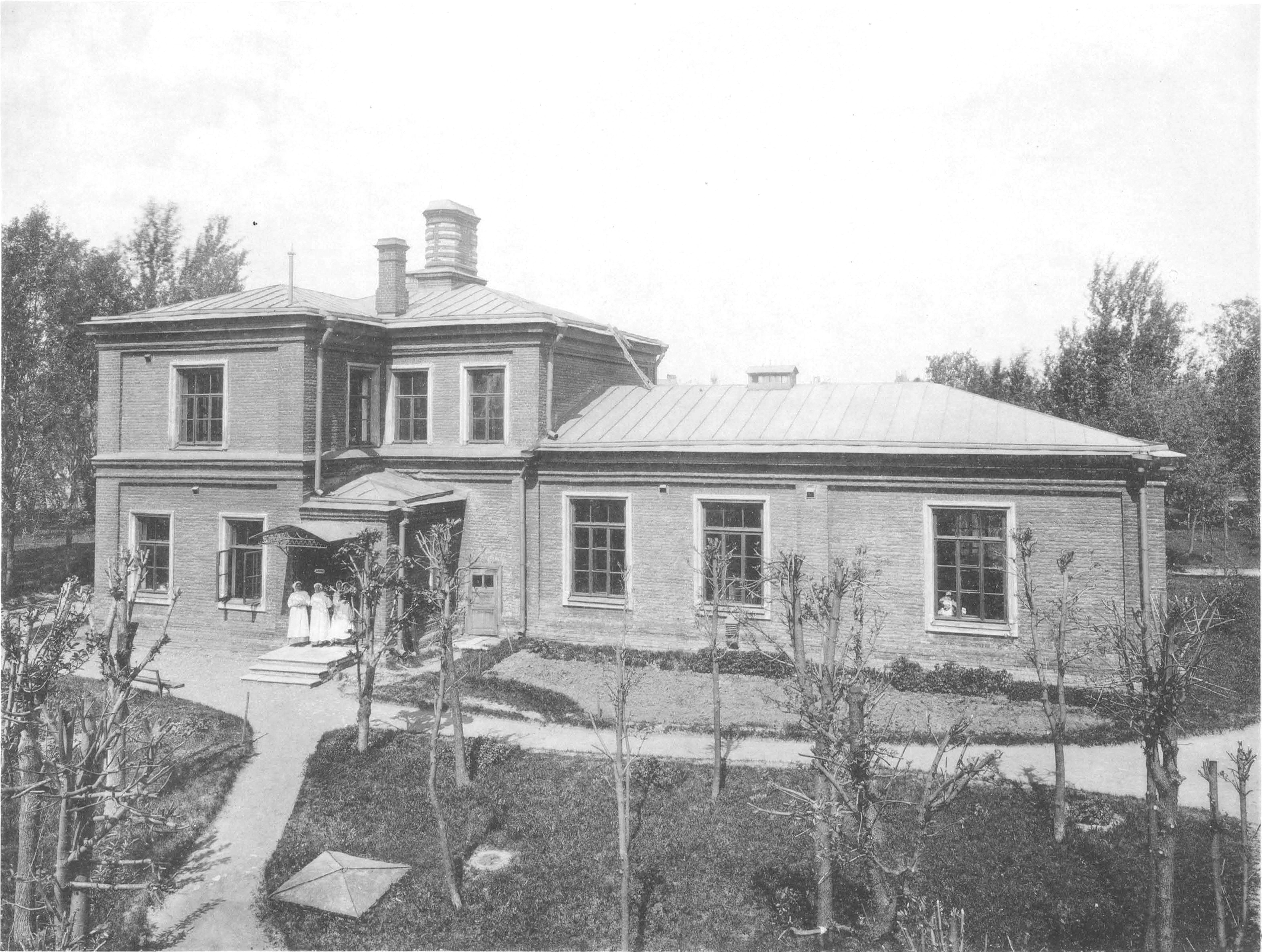 79. ДЪтская больница Св. Владимира. Скарлатинный баракъ (Москва, Сокольники)